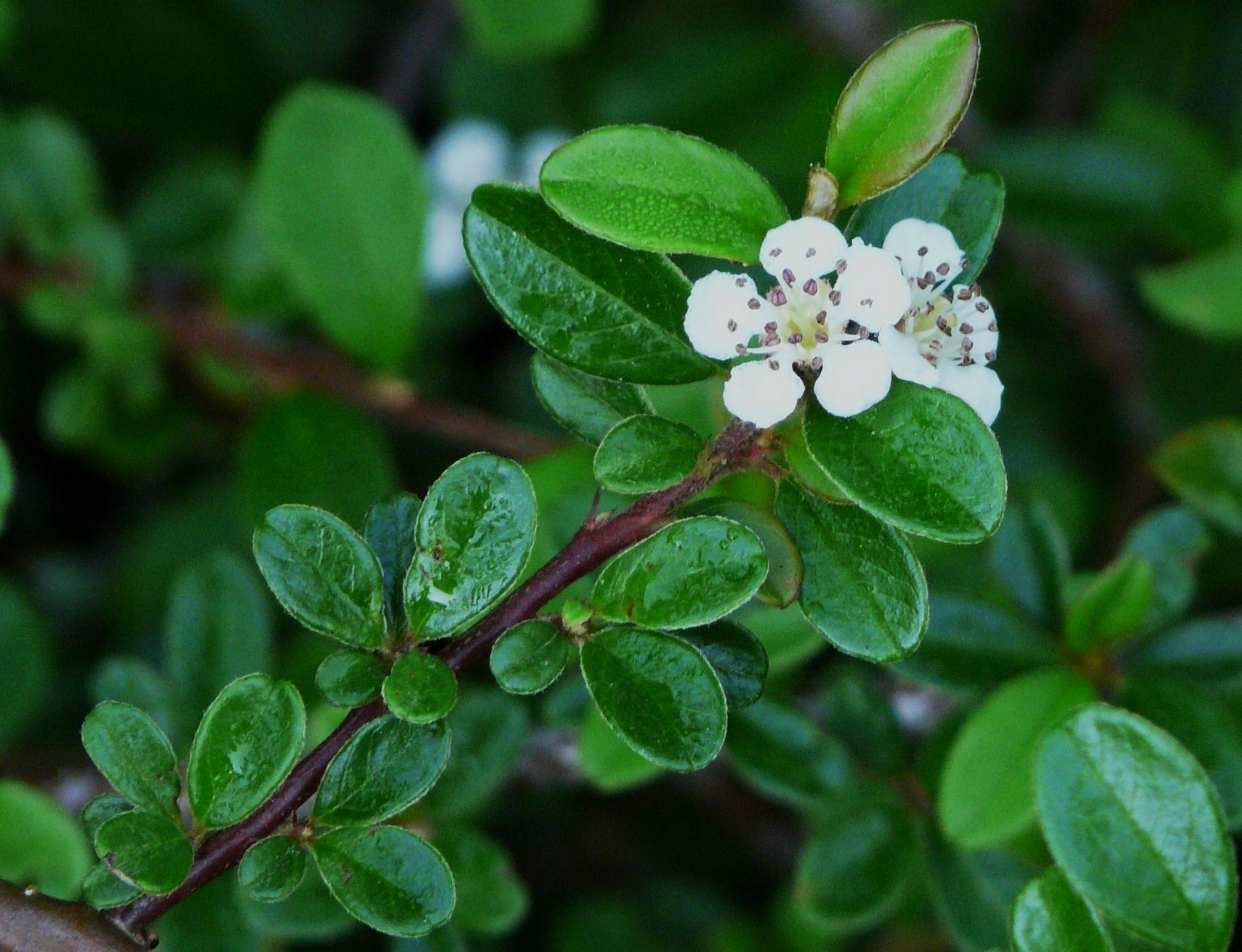 Rameau fleuri de Cotoneaster dammeri